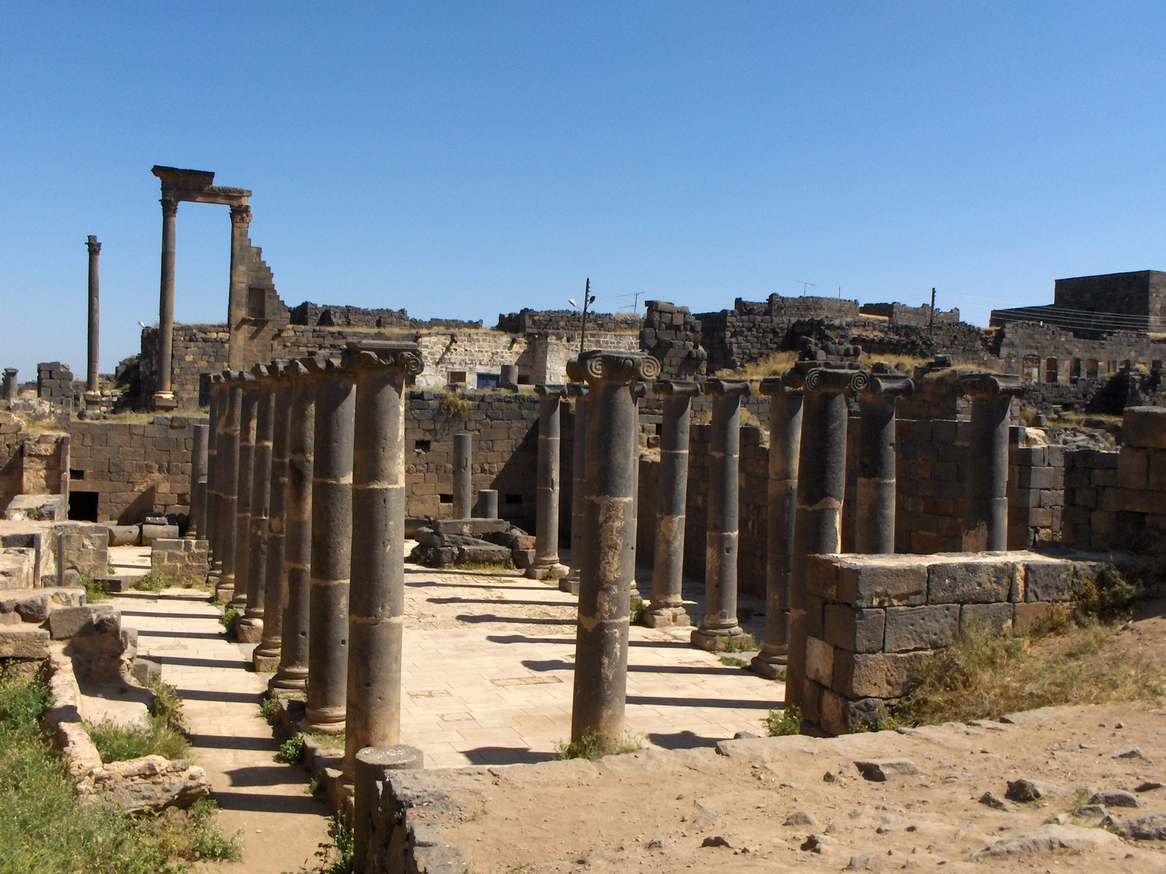 La chiesa a tre navate vicino alle terme sud di Bosra, Siria